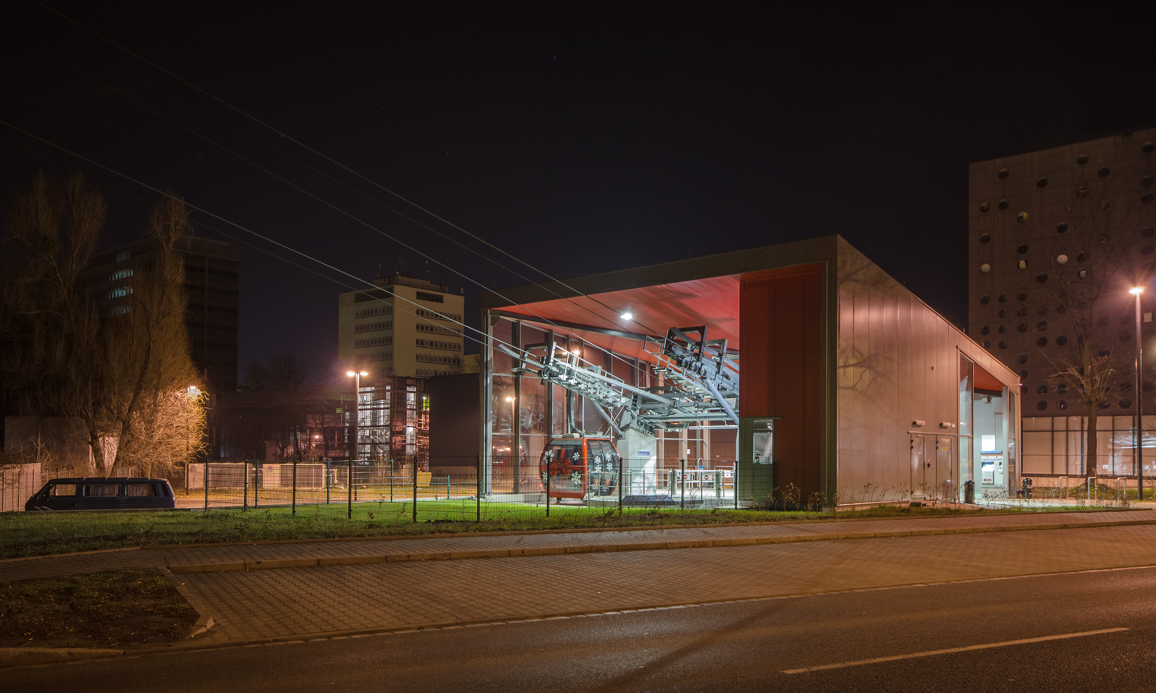 Stacja #2 kolejki linowej "Polinka" na Wybrzeżu Wyspiańskiego, Wrocław